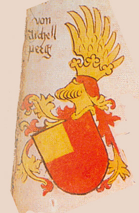 Ingeram-Codex der ehemaligen Bibliothek Cotta von aichelperg freigestellt aus